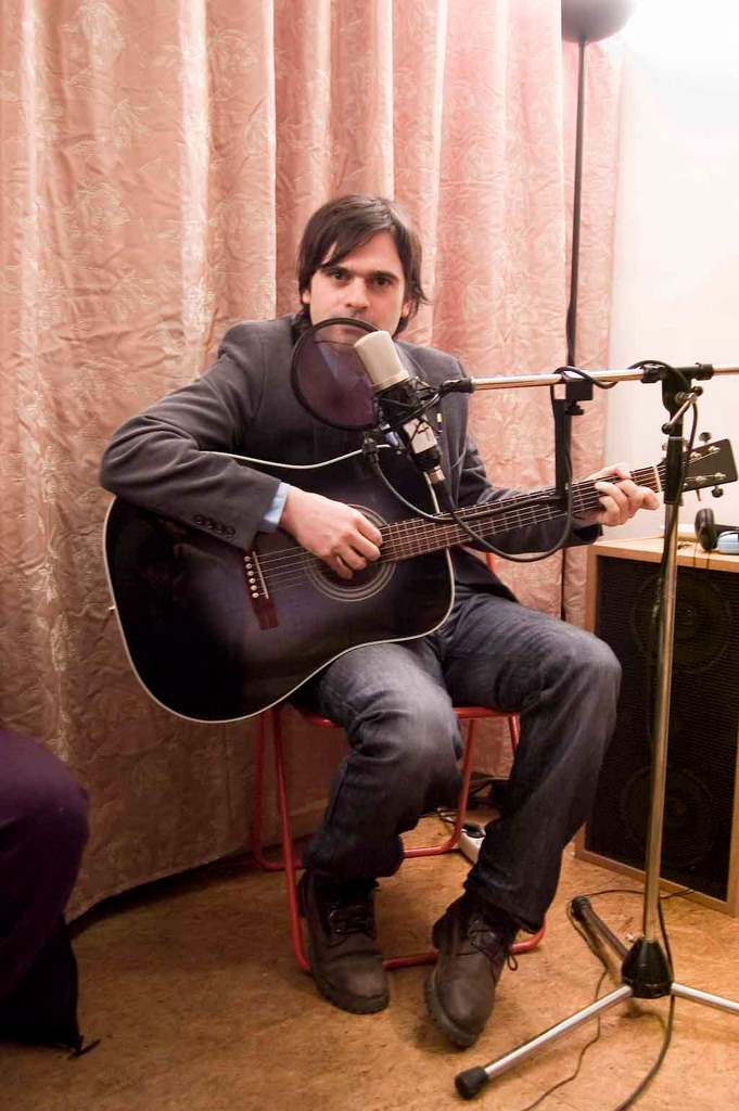 Christoph Theußl am 6. Februar 2010 in Berlin bei der Radiosendung "Berliner Runde" im Studio bei Herbstradio.